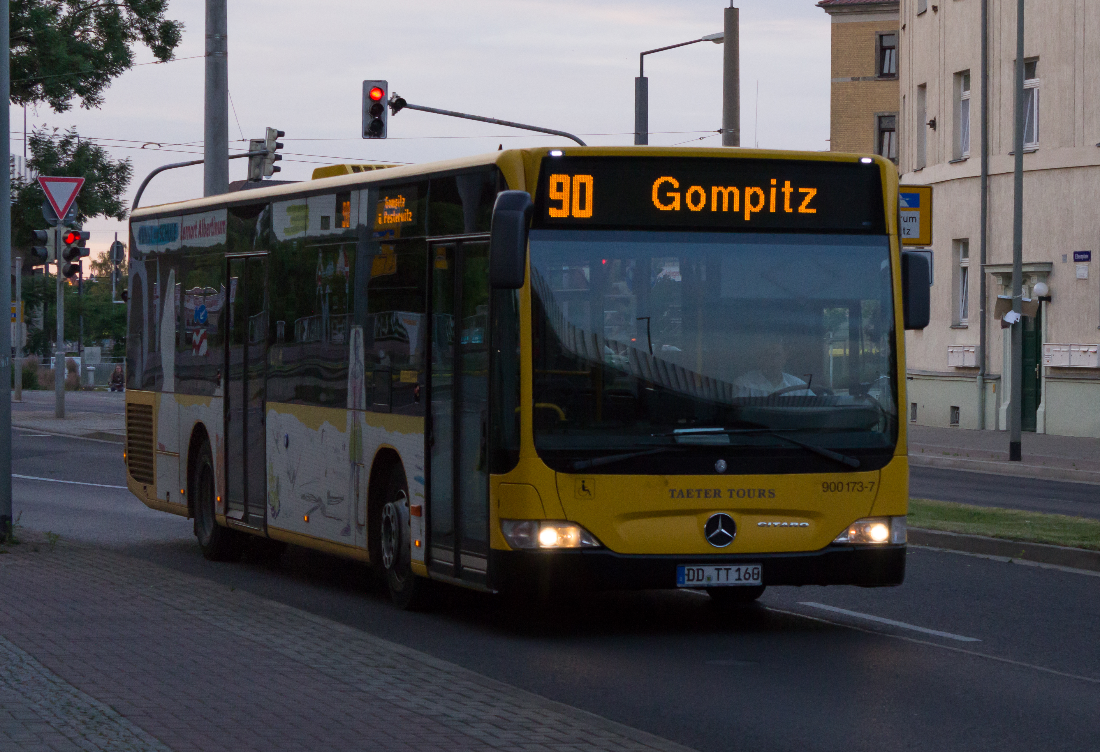 Taeter Tours Bus an der Freiberger Straße in Dresden auf der Linie 90 Richtung Gompitz